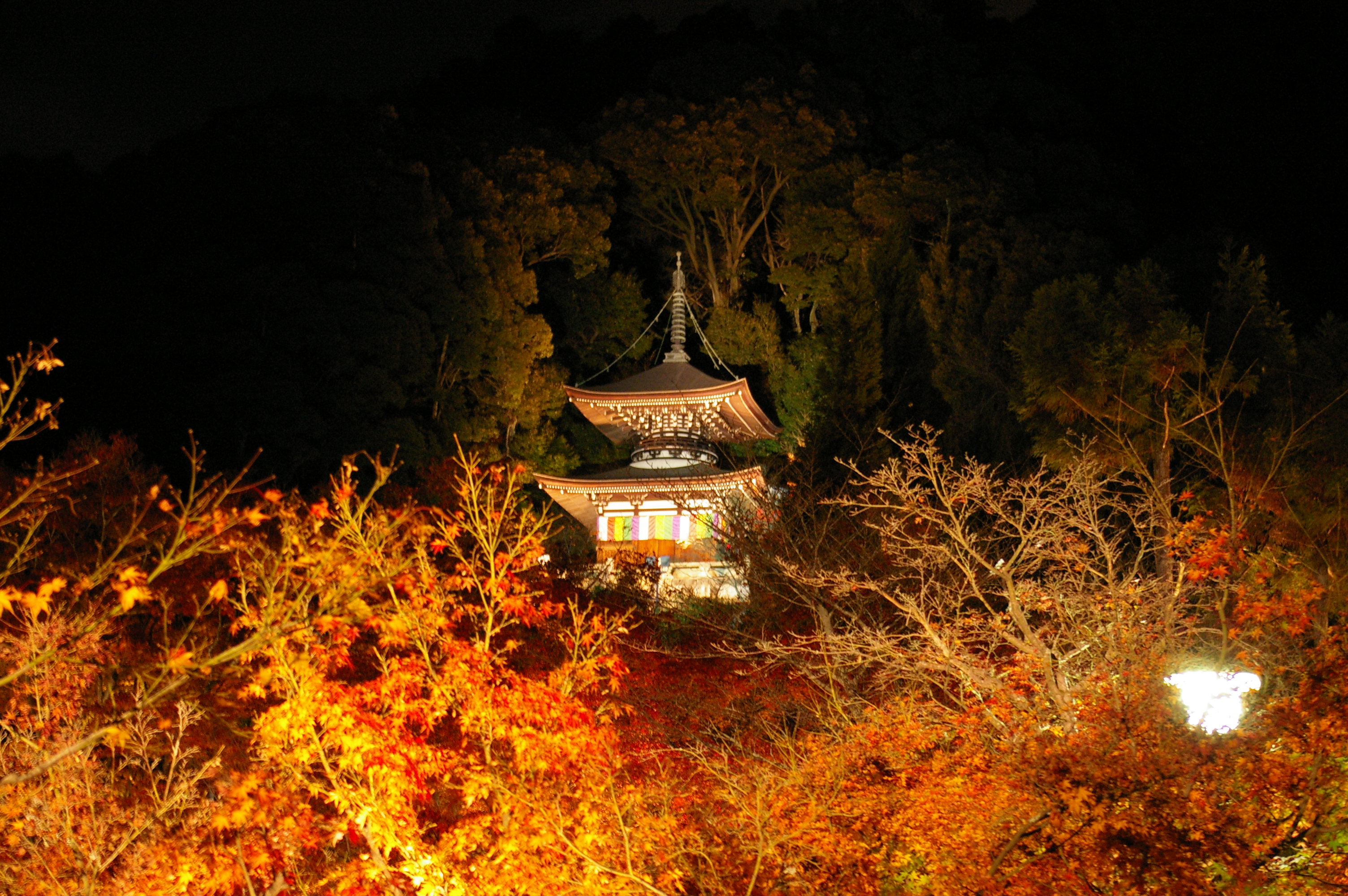 Eikando_Tahoto